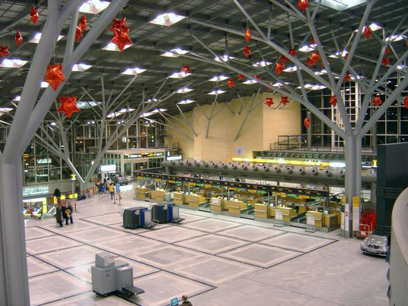 Flughafen Stuttgart Terminal 1